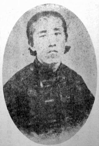 a Japanese man 板垣退助 (Taisuke Itagaki)